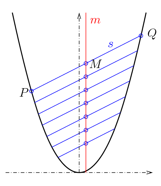 Parabel: Mittelpunkte paralleler Sehnen